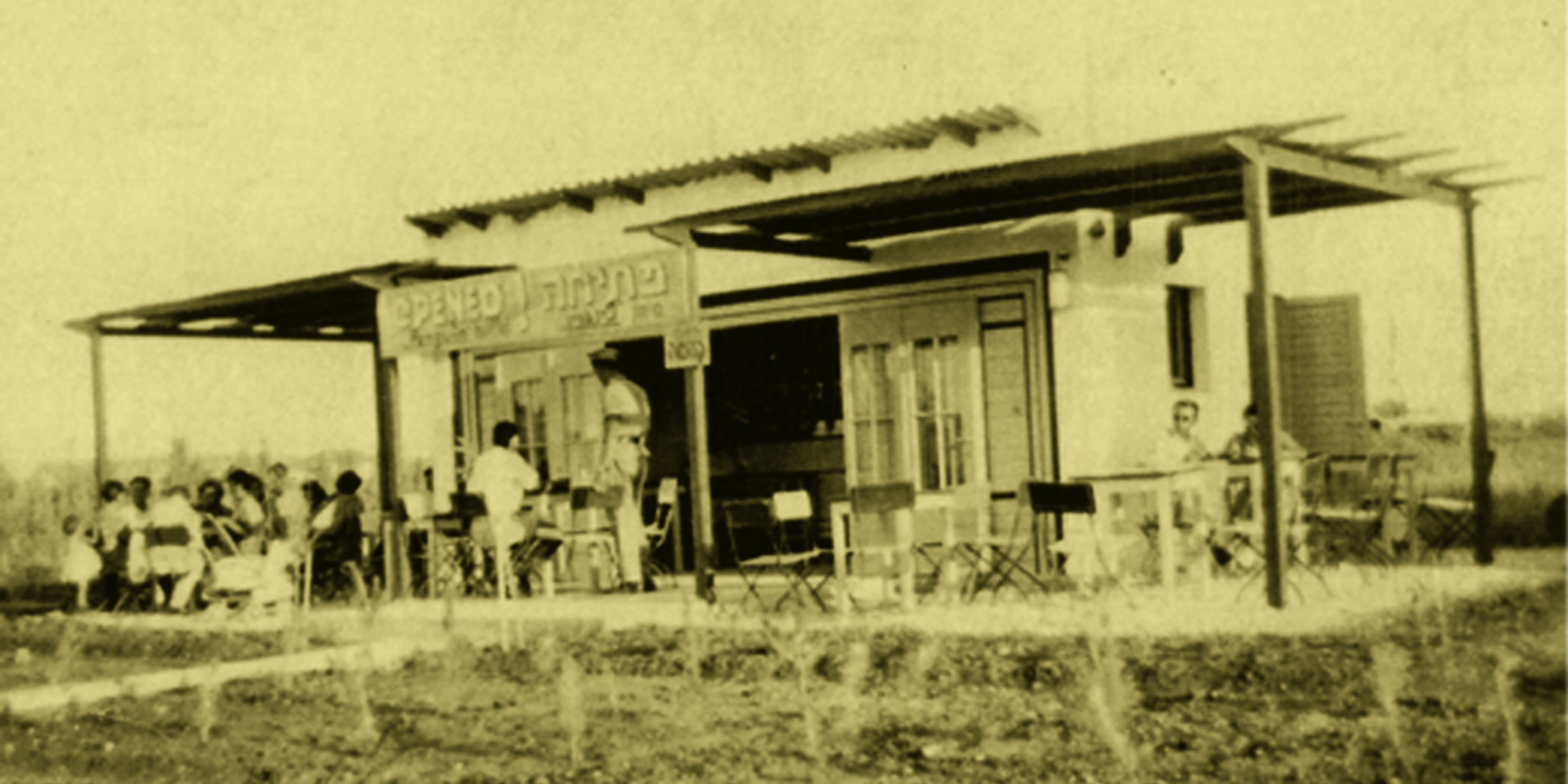 הצריף הראשון, 1940